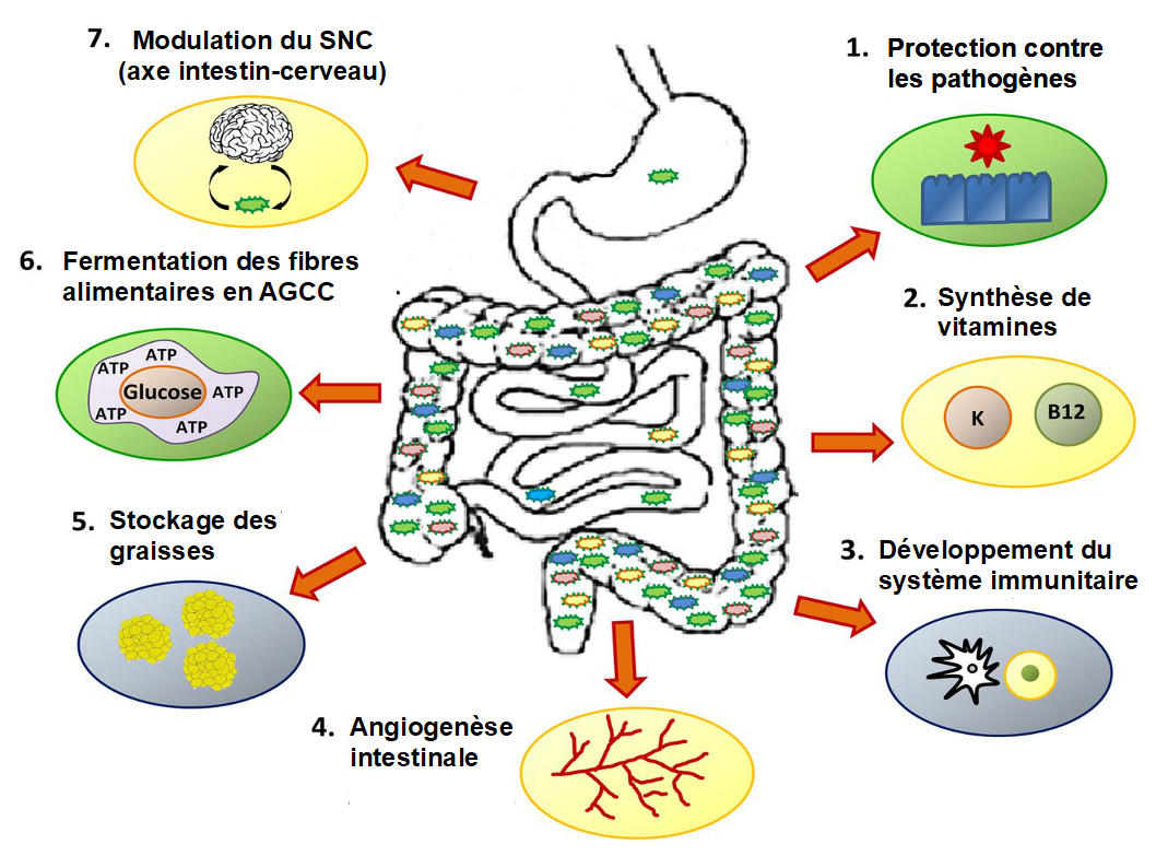 Sept rôles du microbiote intestinal humain